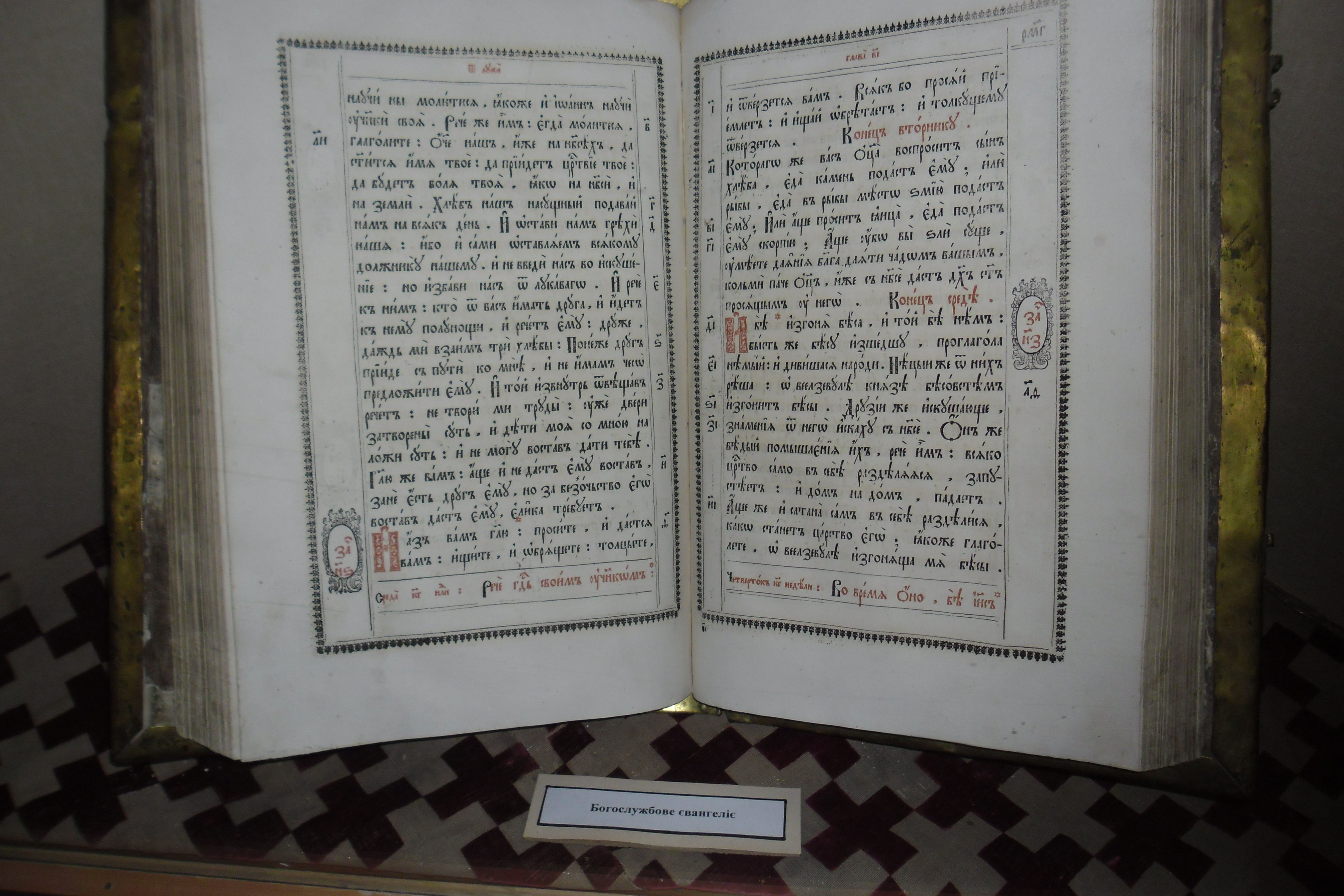 Фото